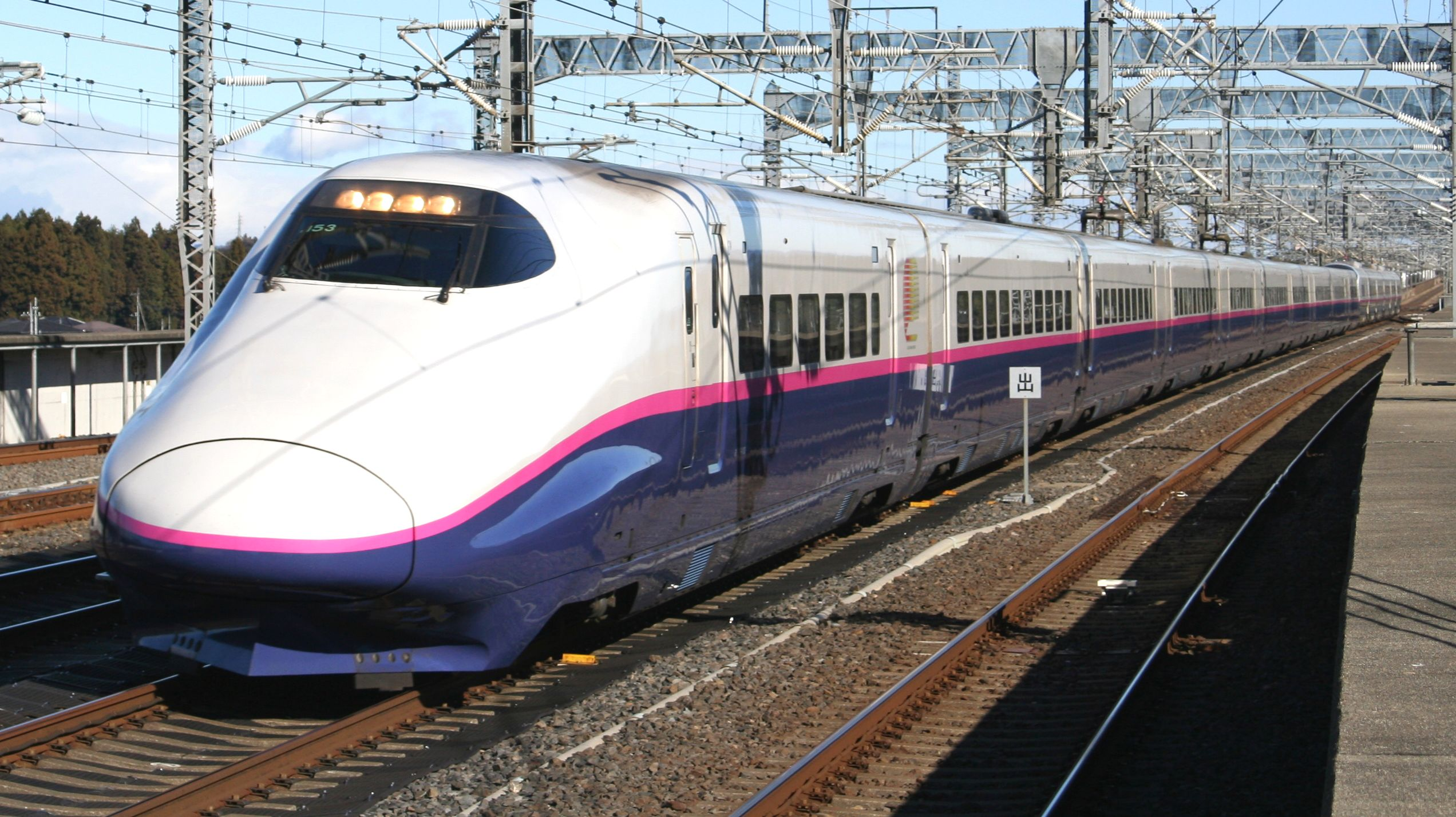 新幹線E2系電車1000番台